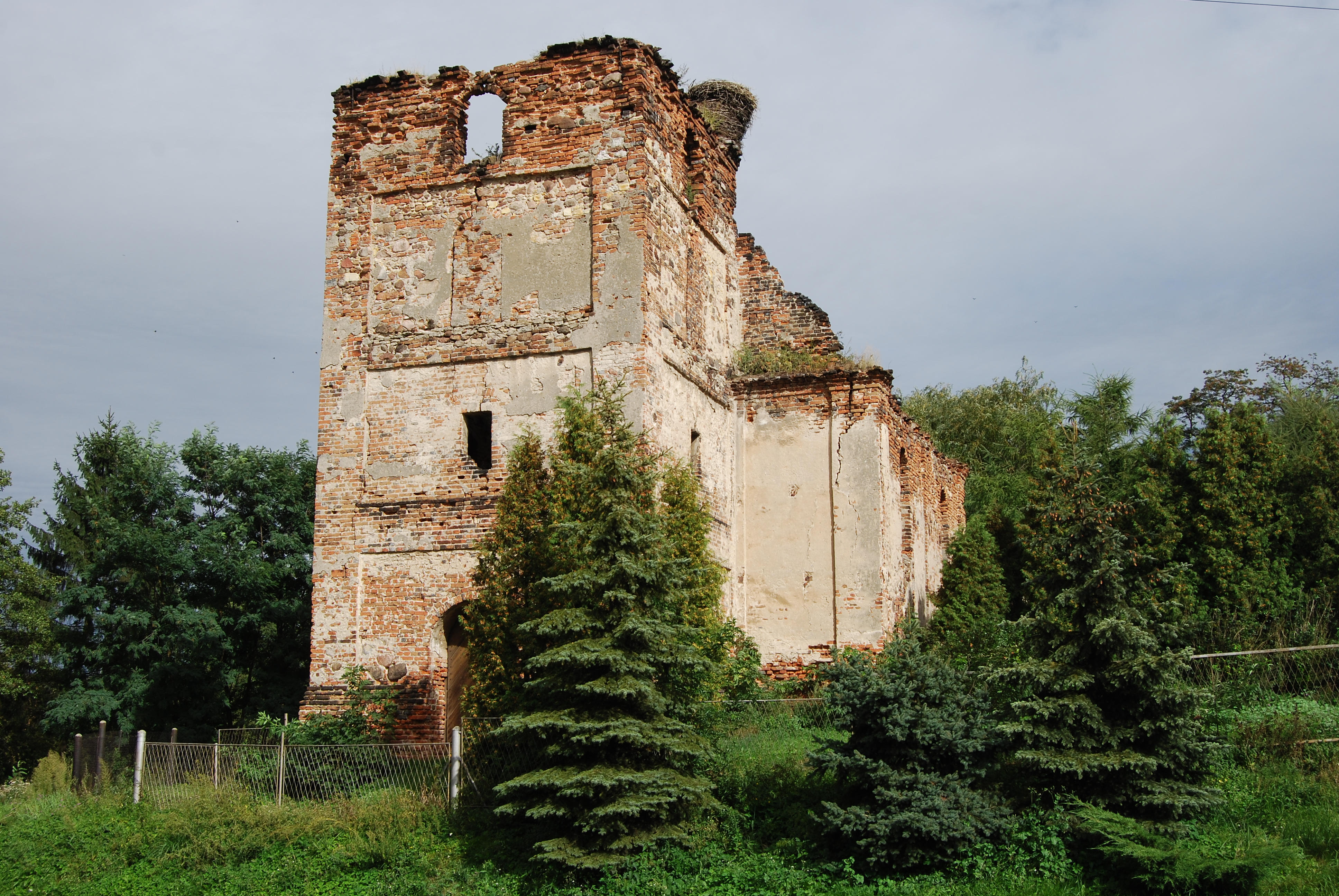 Ziemięcice - ruiny kościoła p. w. św. Jadwigi (zabytek nr A/279/60)